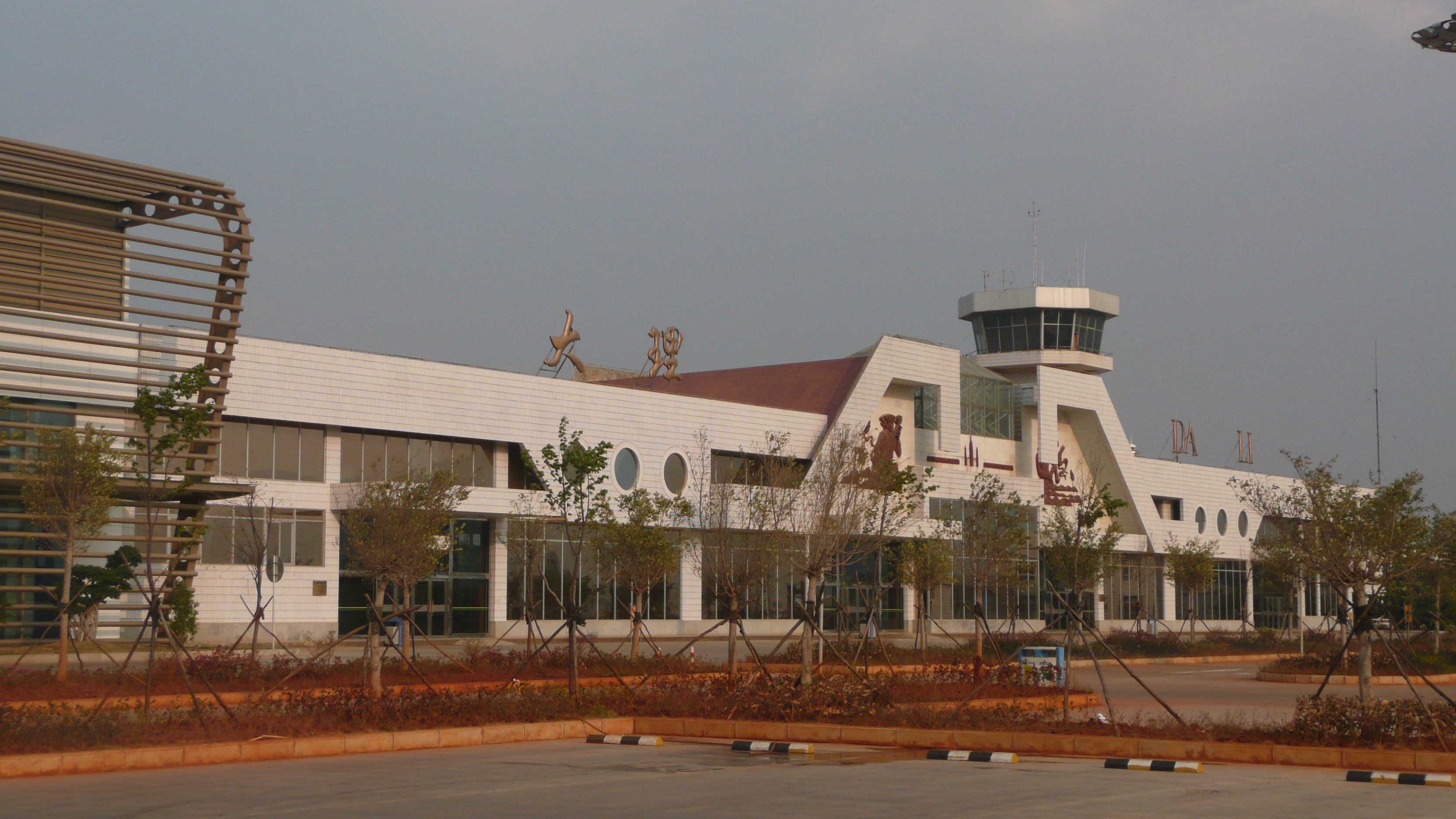 Dali Airport (Yunnan)